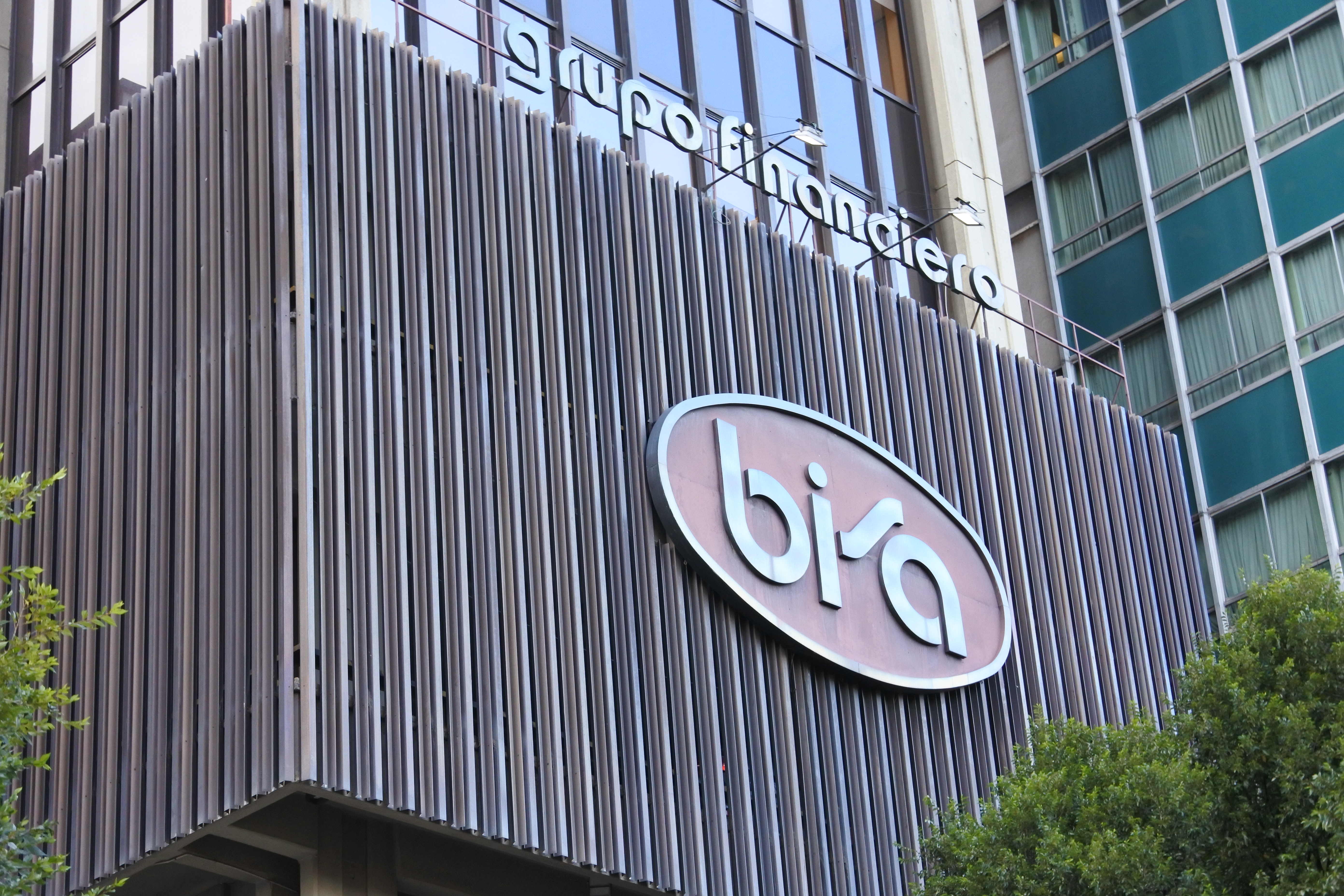 Oficinas centrales de Banco BISA en La Paz.